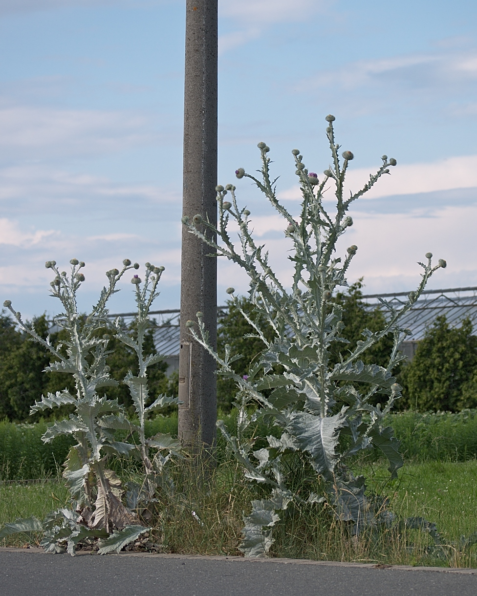 Onopordum acanthium (Eselsdistel). Standort: Fürth